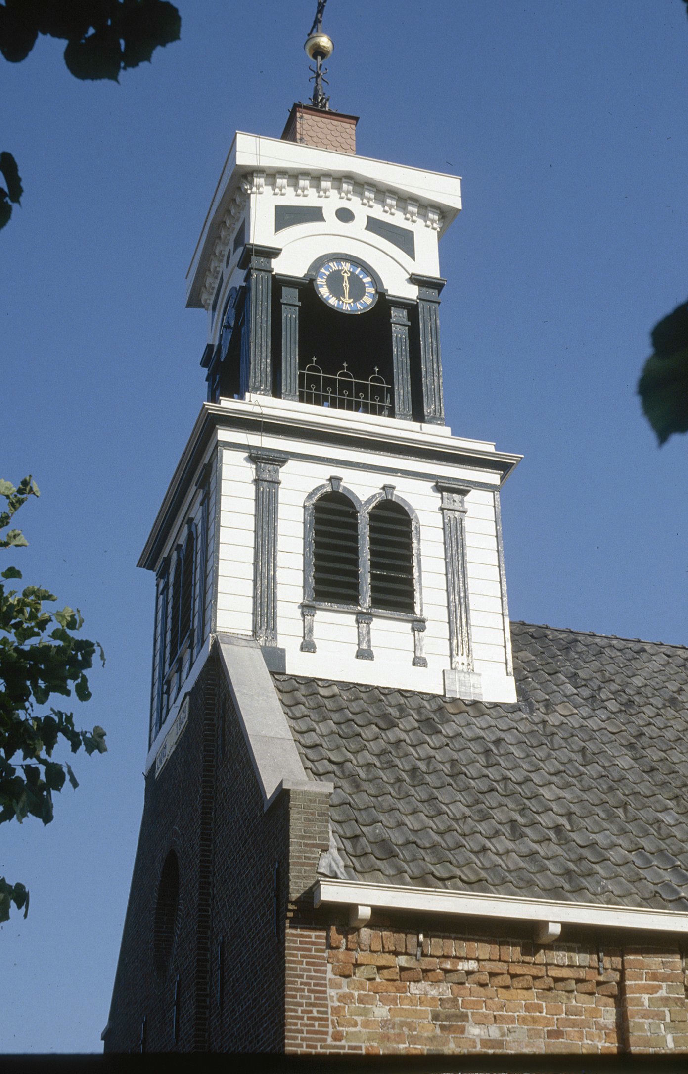 Nederlands Hervormde Kerk: Toren